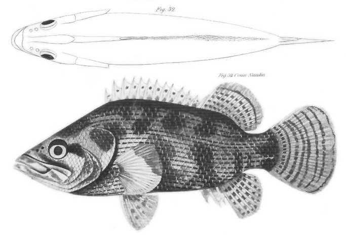 Nandus nadus: Kupferstich zu der Originalbeschreibung als Coius nandus.